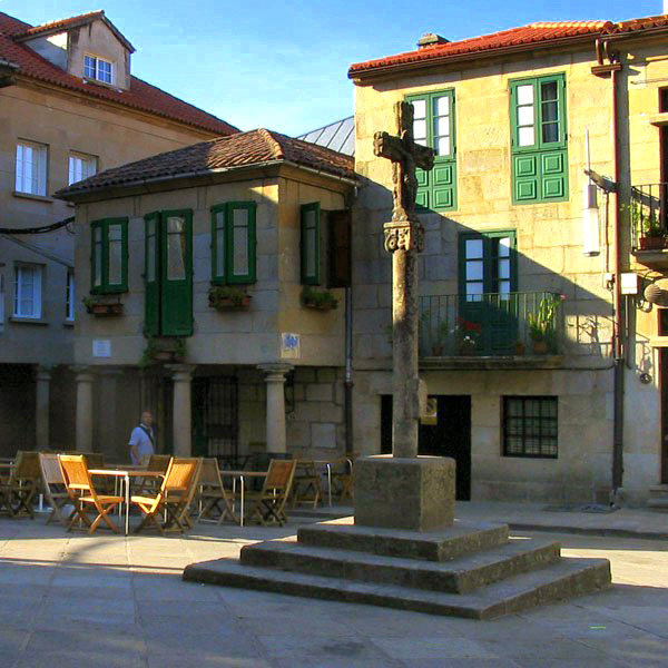 Praza da leña, Pontevedra, Galicia